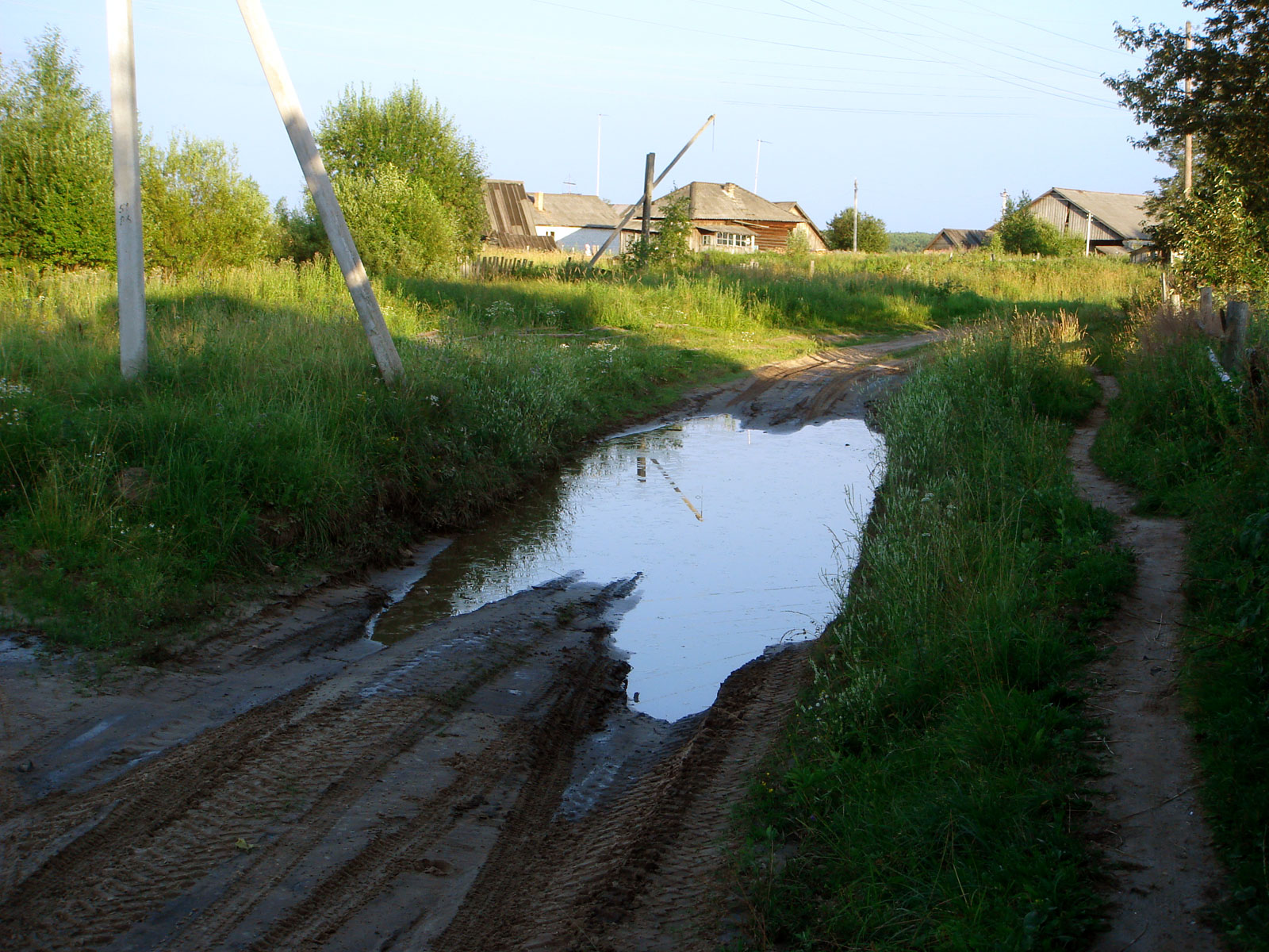 «Вечная» лужа в посёлке Красный Луч, Нижегородская область, Россия.